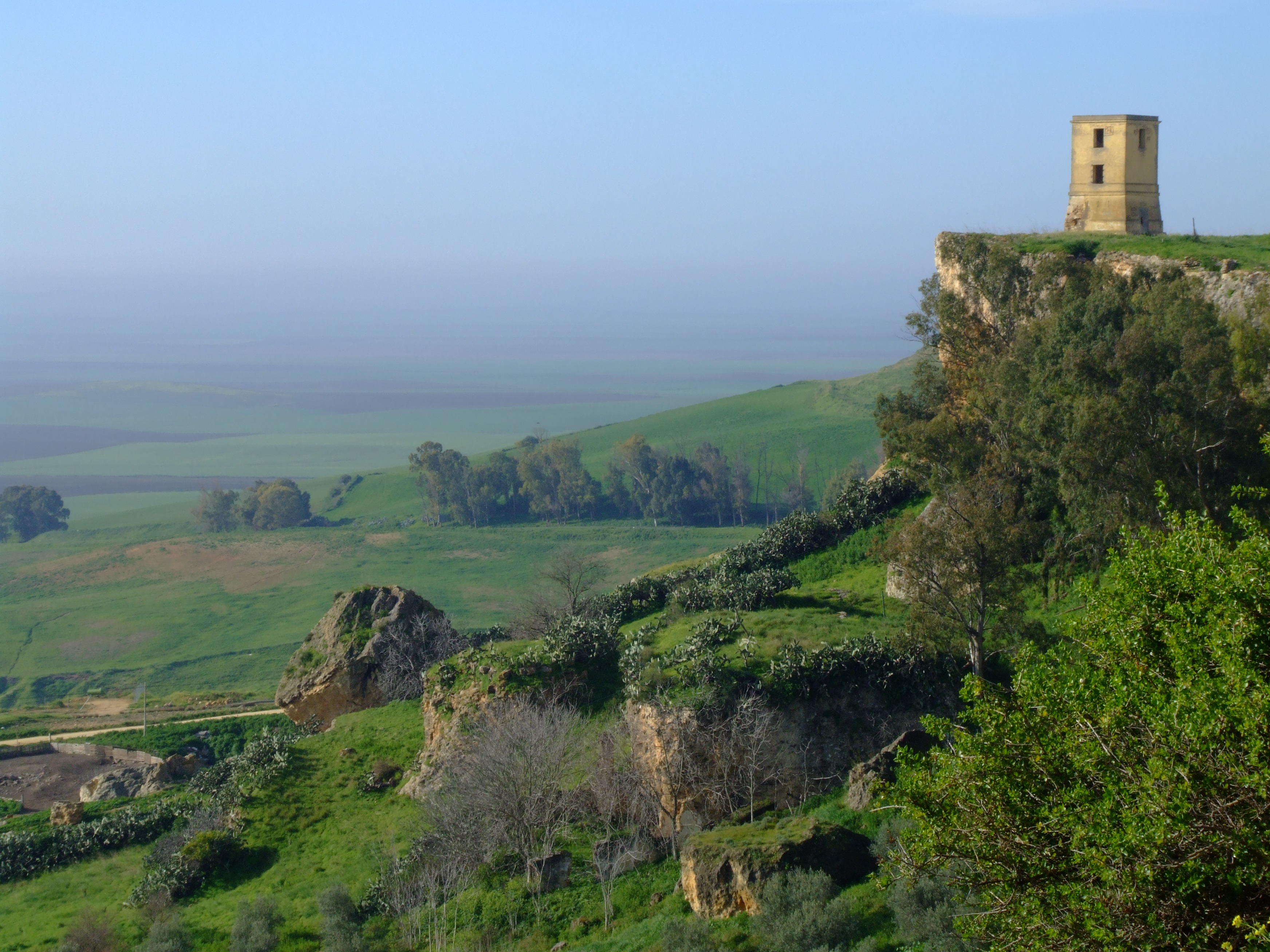 El Picacho. Carmona (a la derecha la torre óptica nº 45, de la Línea telegráfica de Andalucía de Mathé)